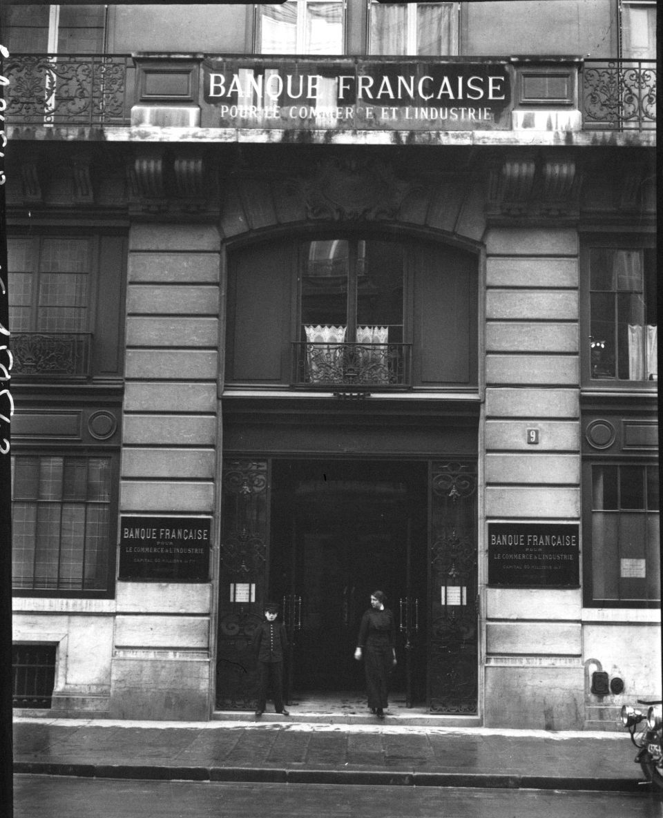 Banque française pour le commerce et l'industrie : entrée rue Scribe